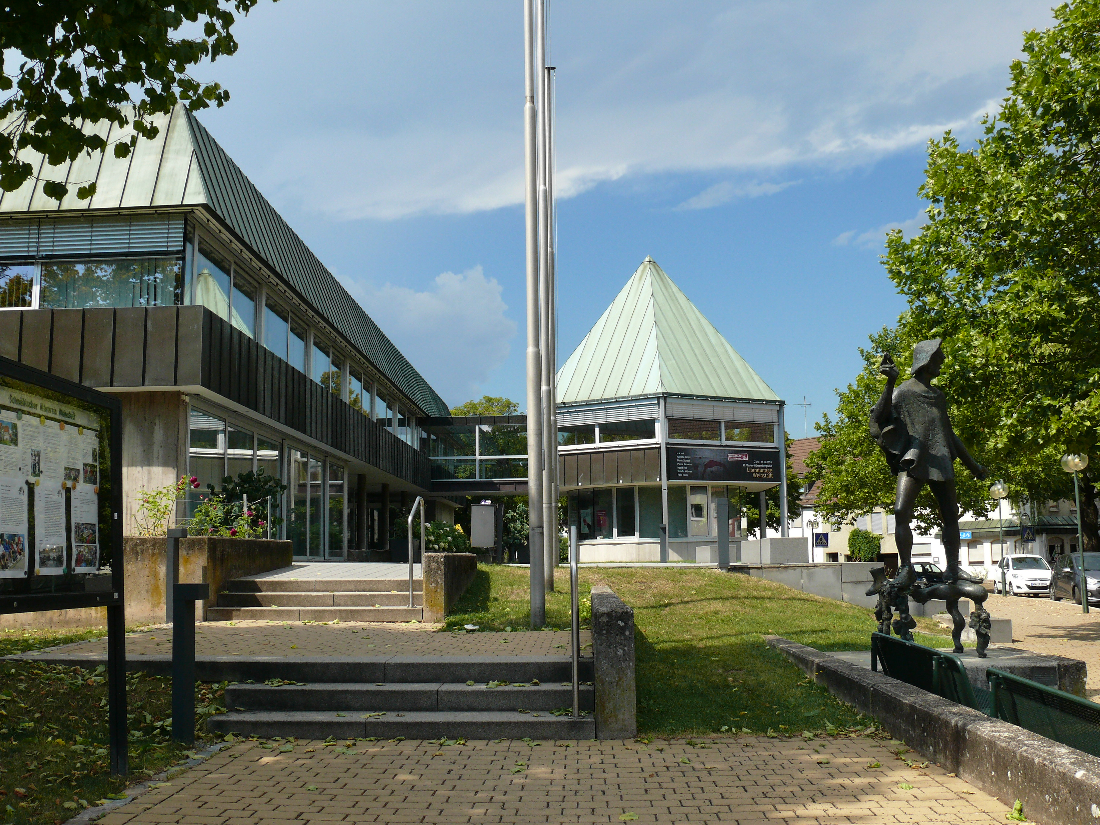 Das Weinstädter Rathaus am Marktplatz im Teilort Beutelsbach.